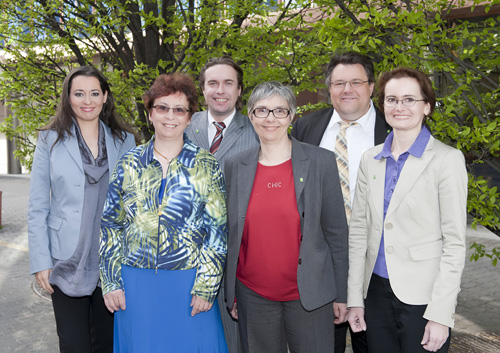 Das Präsidium des VAAÖ 2011 ( v.l.n.r.: Mag.pharm. Susanne Ergott-Badawi, Mag.pharm. Andrea Vlasek, Mag.pharm. Raimund Podroschko, Mag.pharm. Ulrike Mayer, Mag.iur. Norbert Valecka, Mag.pharm. Elisabeth Biermeier)